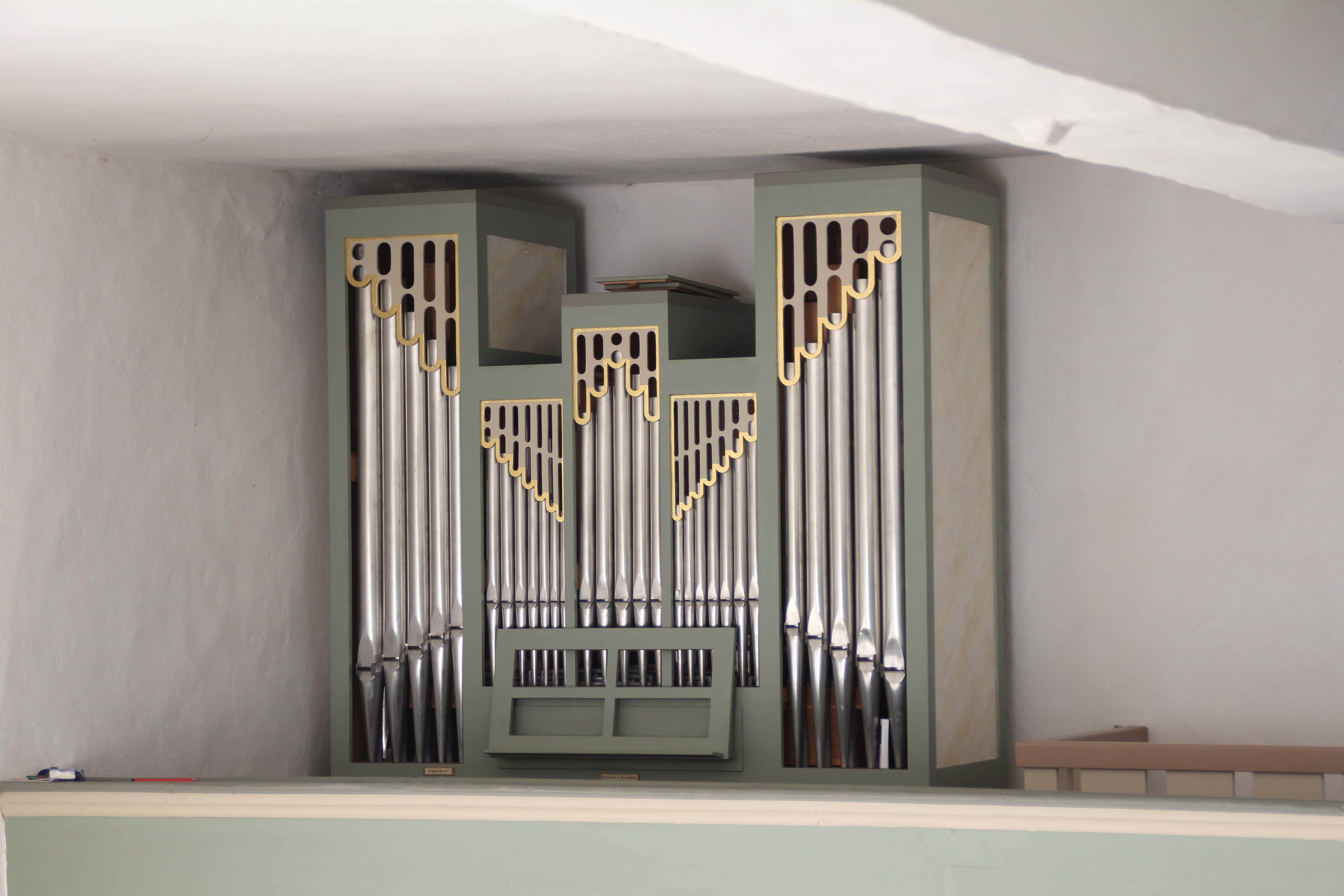 Orgel der Evangelischen Kirche Beltershain, Stadt Grünberg, Landkreis Gießen, Hessen, Deutschland